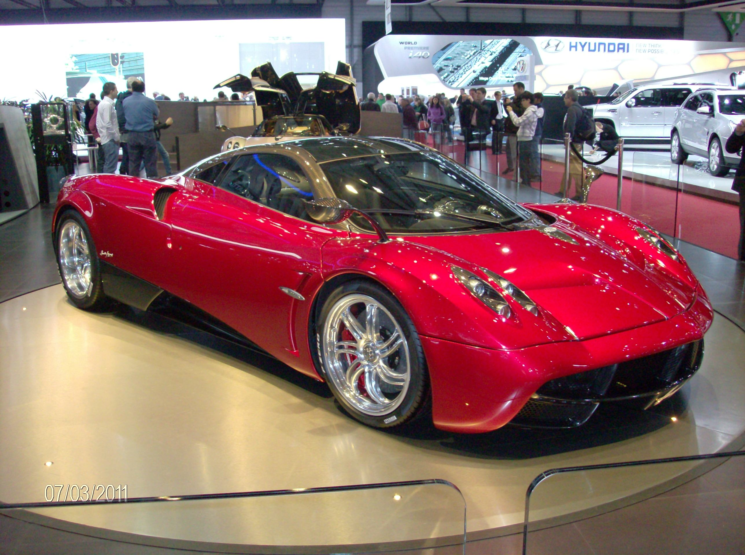 Pagani Huayra, 81° Salone dell'auto di Ginevra, 2011